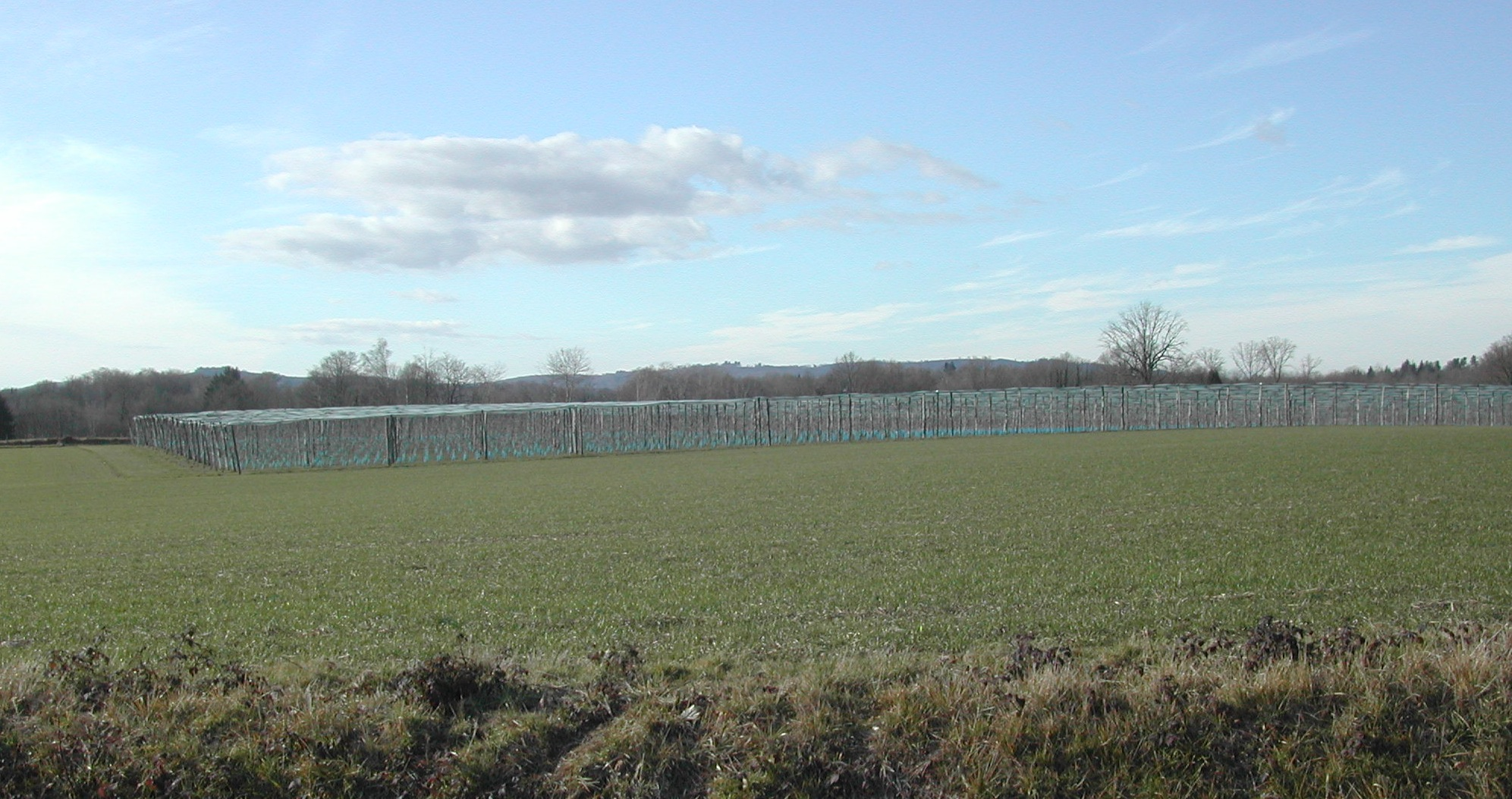 Vue d'un paysage du Chalard avec au milieu, des pommeraies.